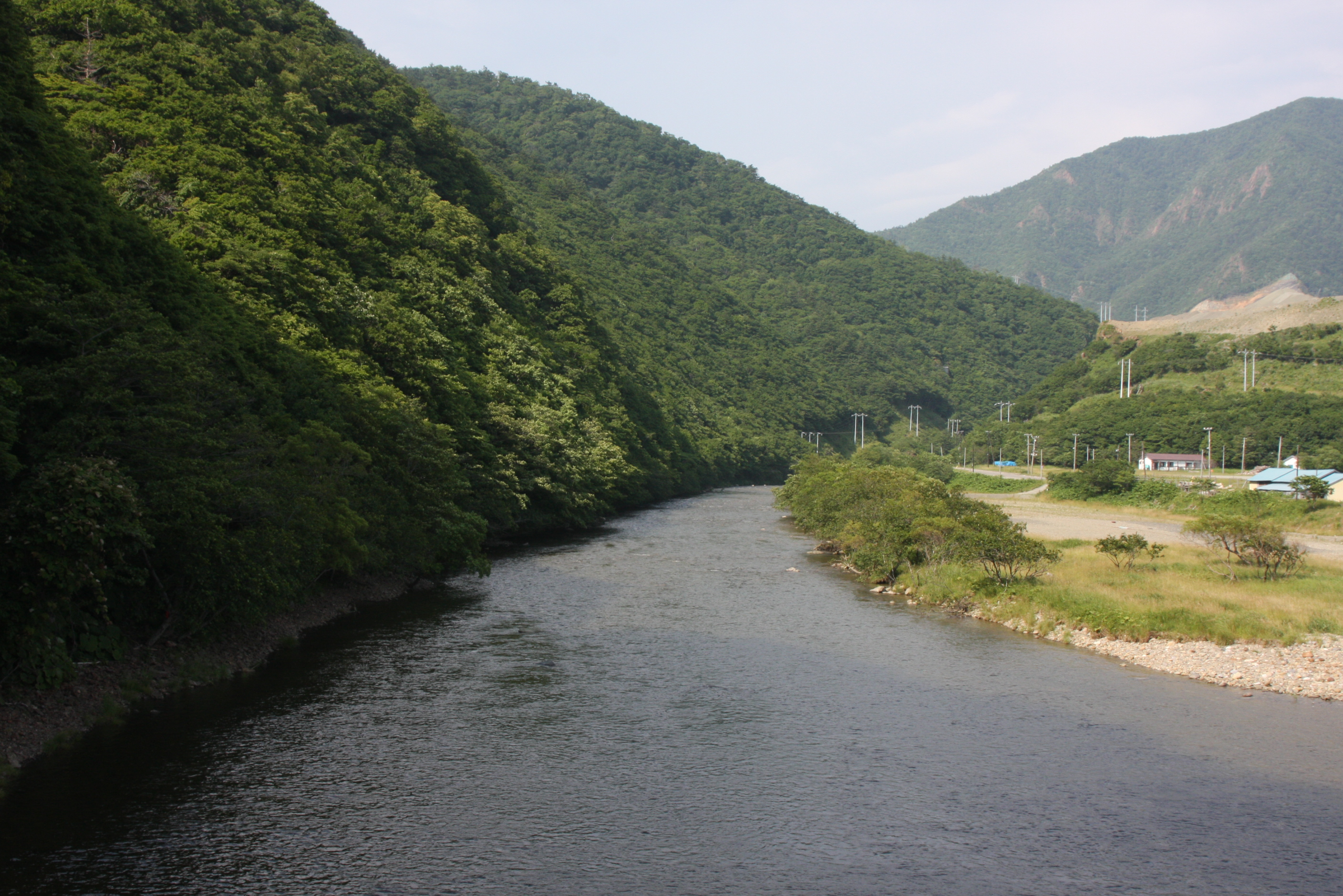 幌満川 幌満橋より上流を望む